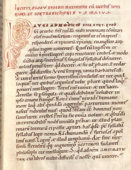 Hieronymi libri II contra Jovinianum. Manuscript; 229 Bl. - Pergament. Mane 12th century.